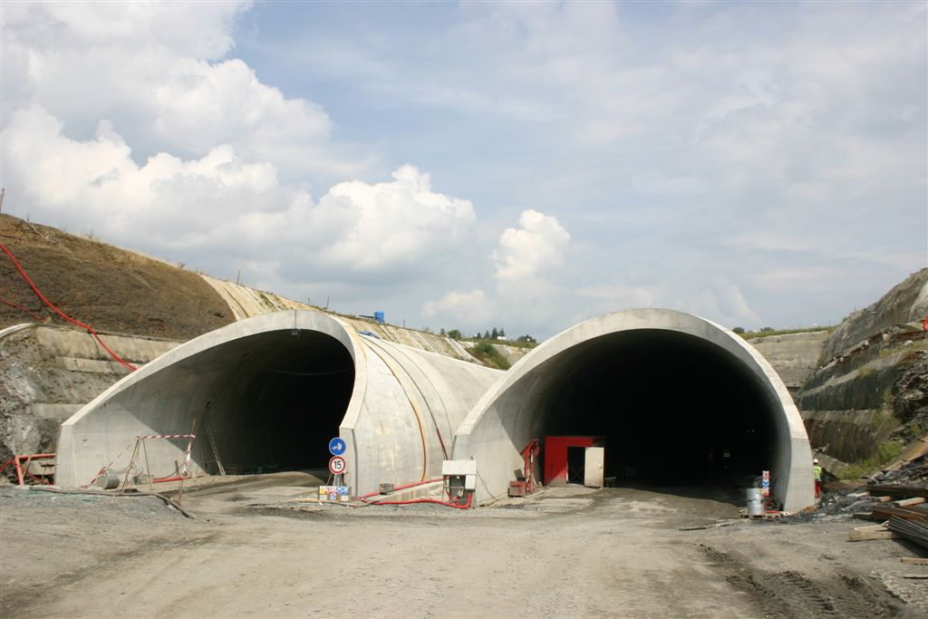 Klimkovický tunel, foto z výstavby.